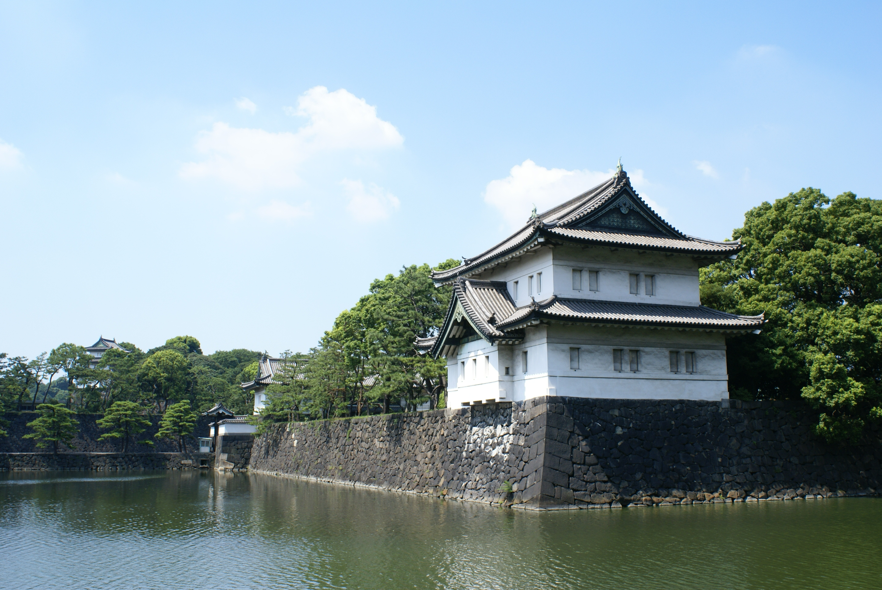 江戸城桜田巽櫓